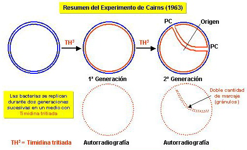 experimento de Cairns: evidencia de origen de replicación en E. coli